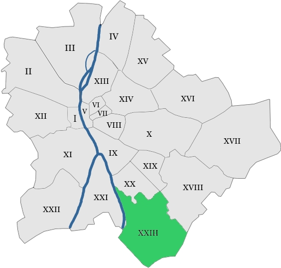 map hungary budapest district 23